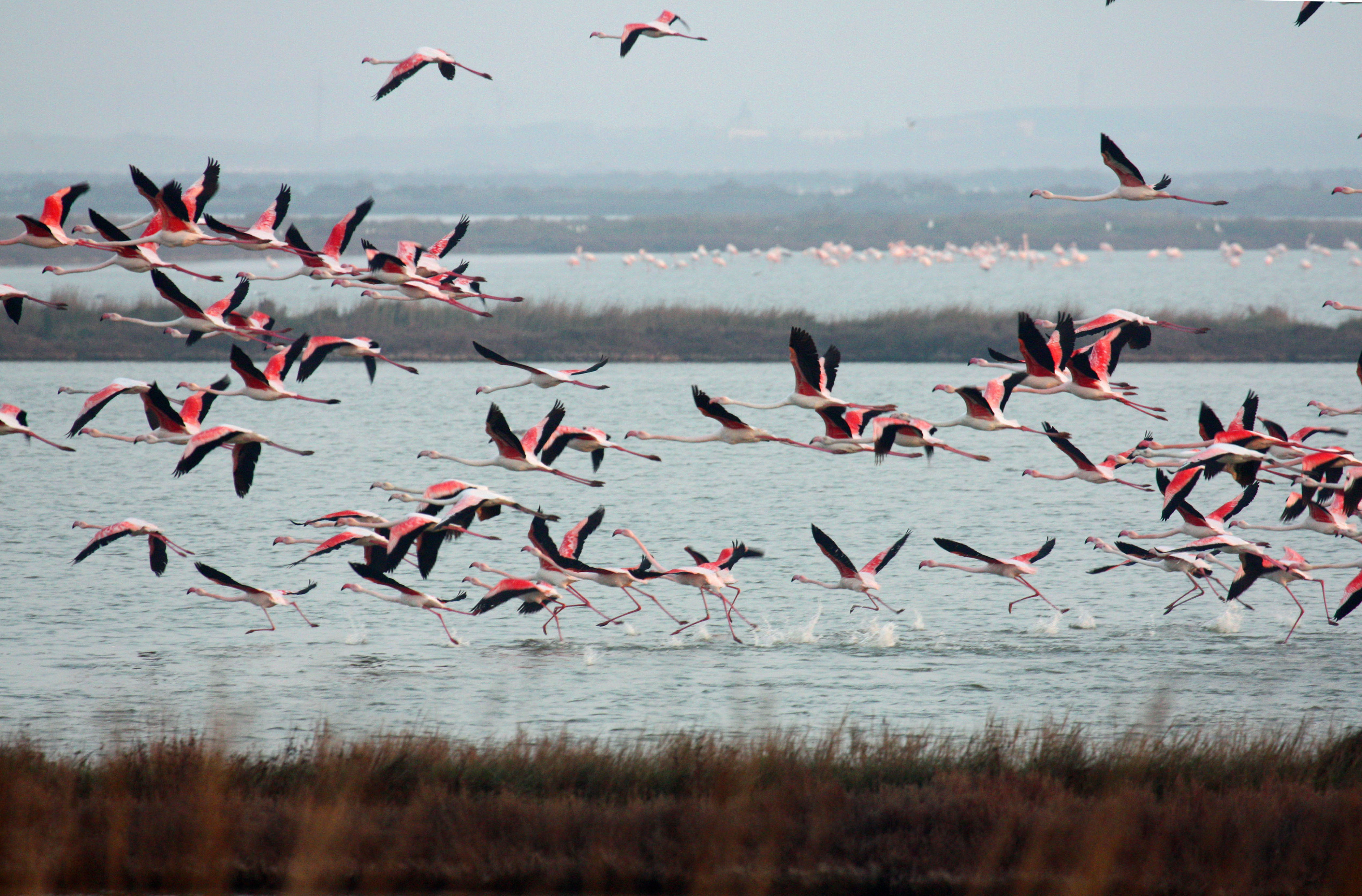 Decollo